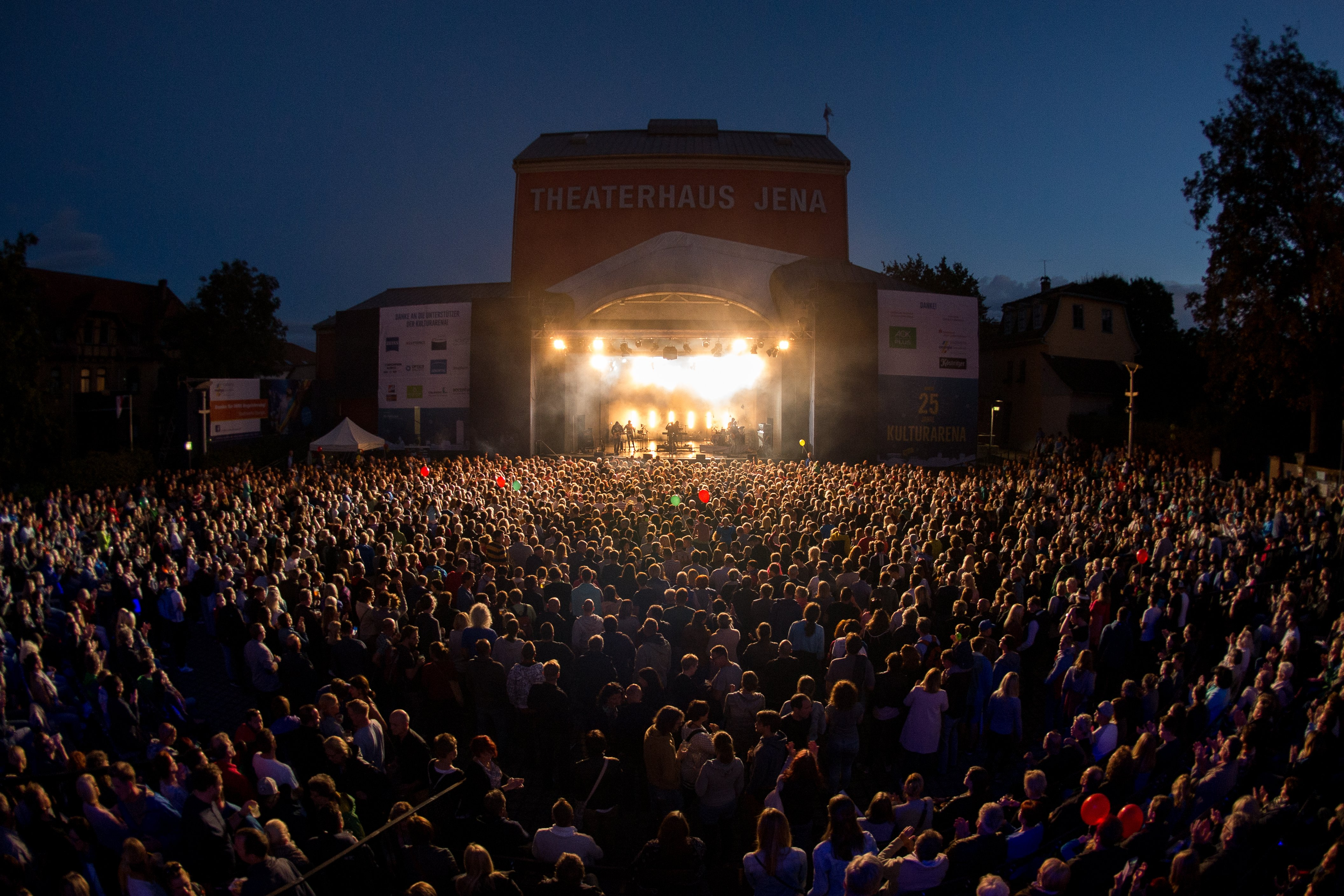 Kulturarena Jena, 21.08.2016, Konzert auf dem Theaterplatz